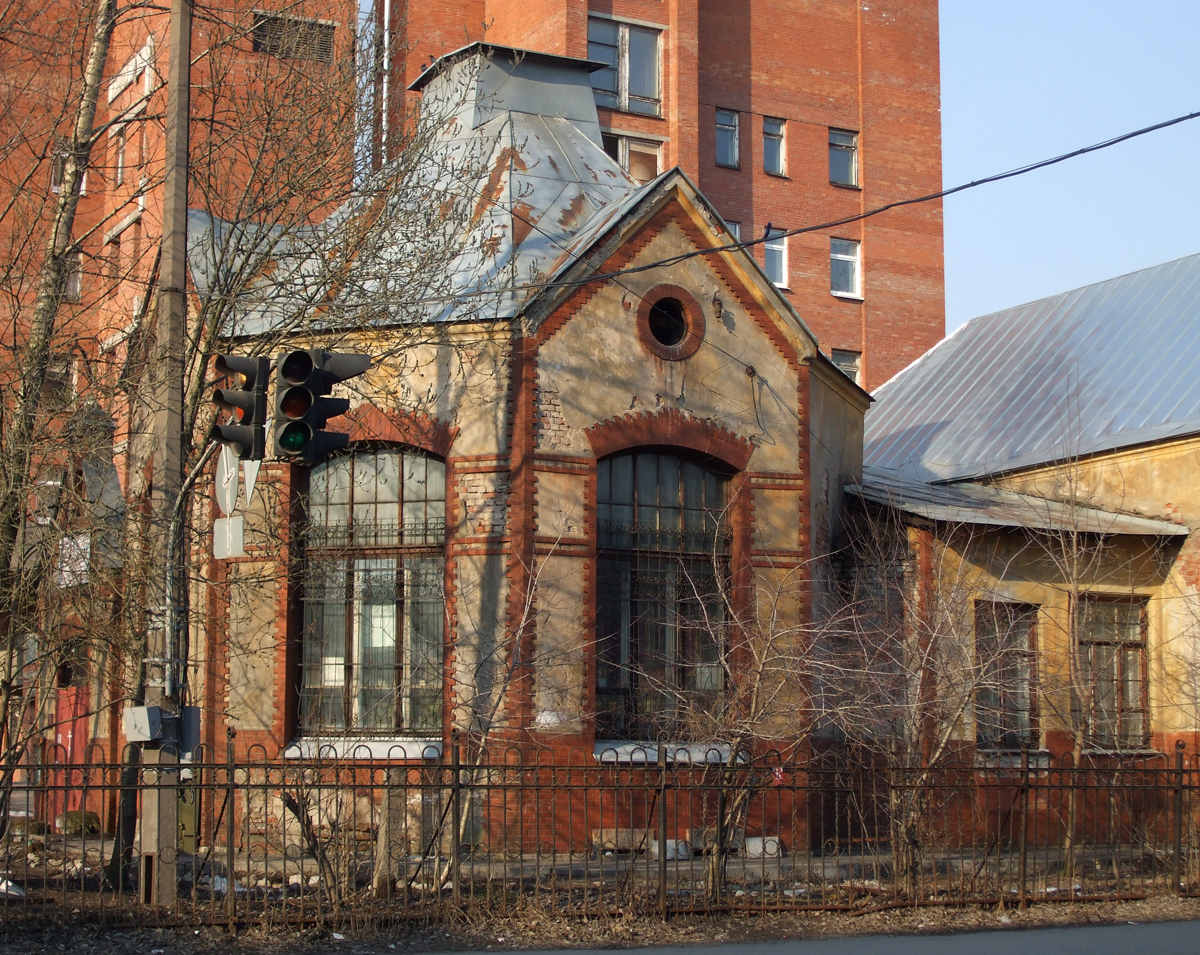 Храм святых страстотерпцев царя Николая и царицы Александры при педиатрической академии